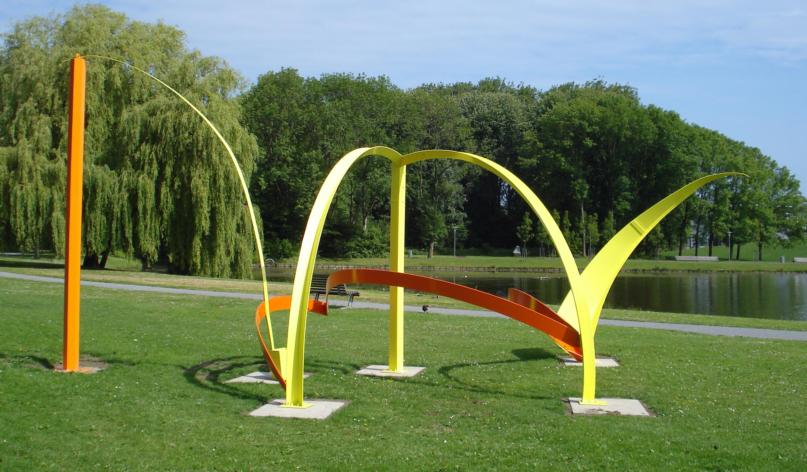 Rotterdam, Zuiderpark, ter hoogte Oldengaarde / Meyenhage (tot 2008 in Parklaan bij Veerhaven). Sculpture Quill (1971) by Phillip King. Rotterdam/The Netherlands